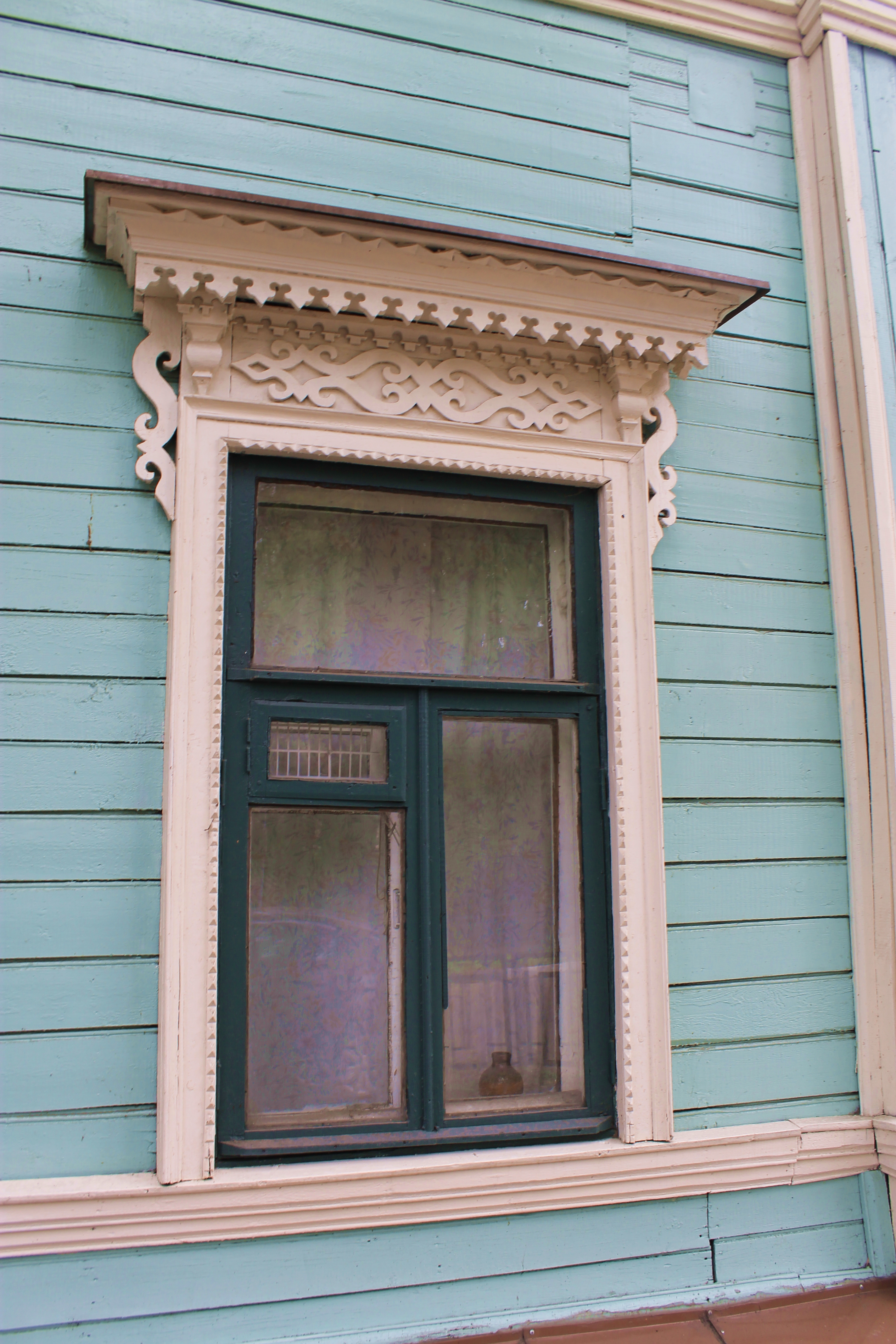 Жилой дом Скворцовой: улица Короленко, 18, Нижний Новгород, Нижегородская область